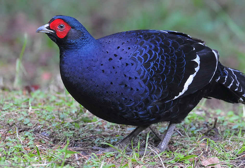 Male Mikado Pheasant (Syrmaticus mikado)